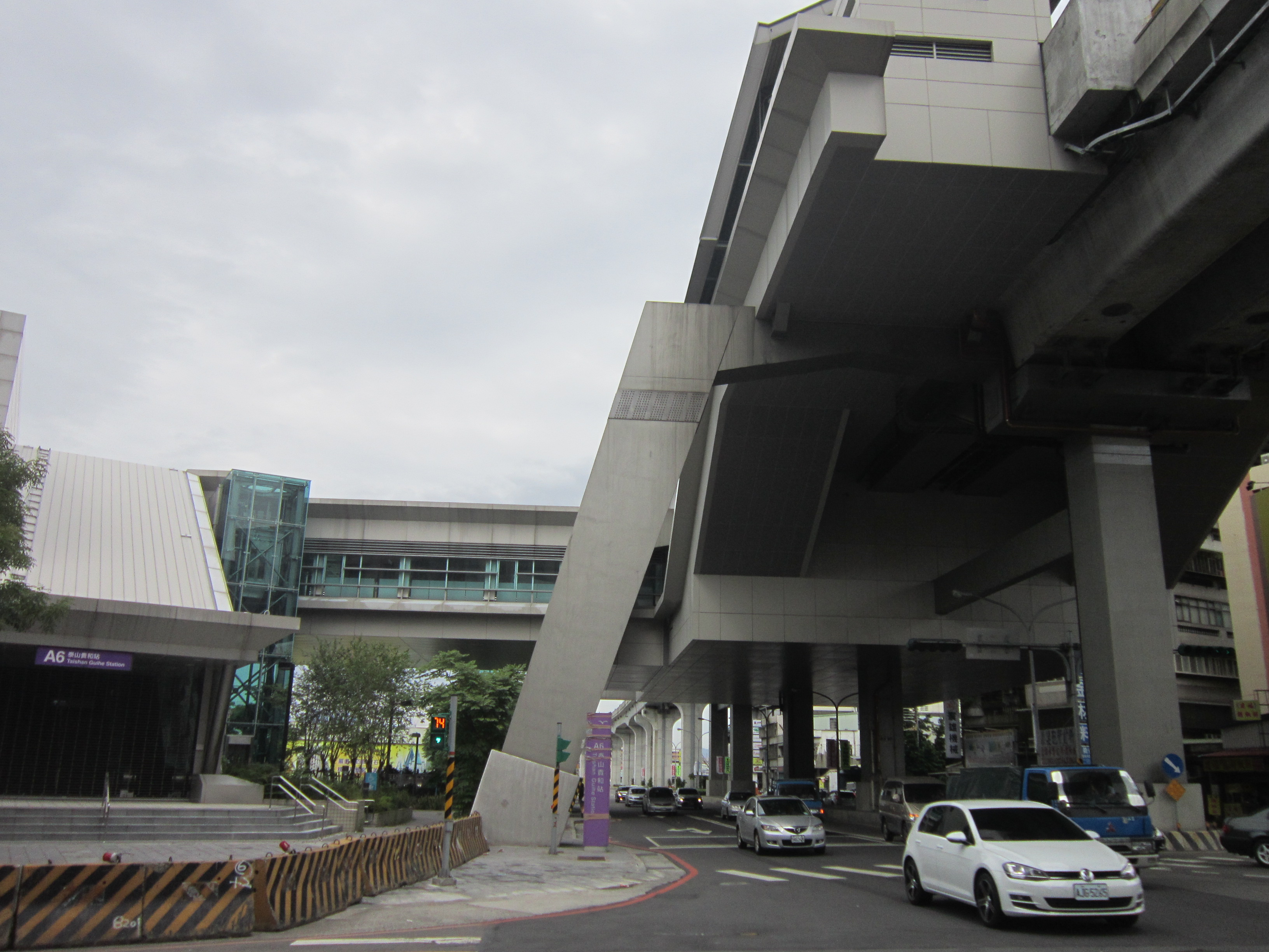 機場捷運泰山貴和站(2016年7月尚未開始啟用)